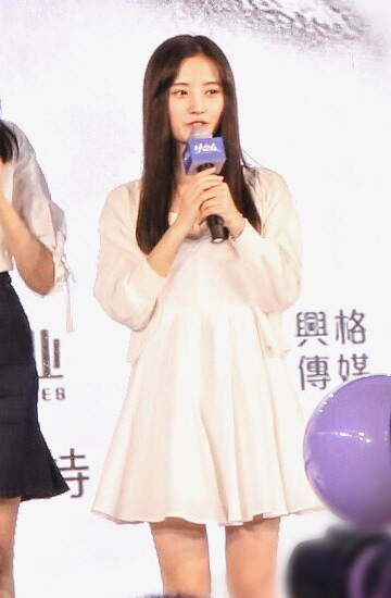 中文（中国大陆）: 甜甜甜 小鞠太太太太美 晓彤妹子也很漂亮！ (鞠婧祎)